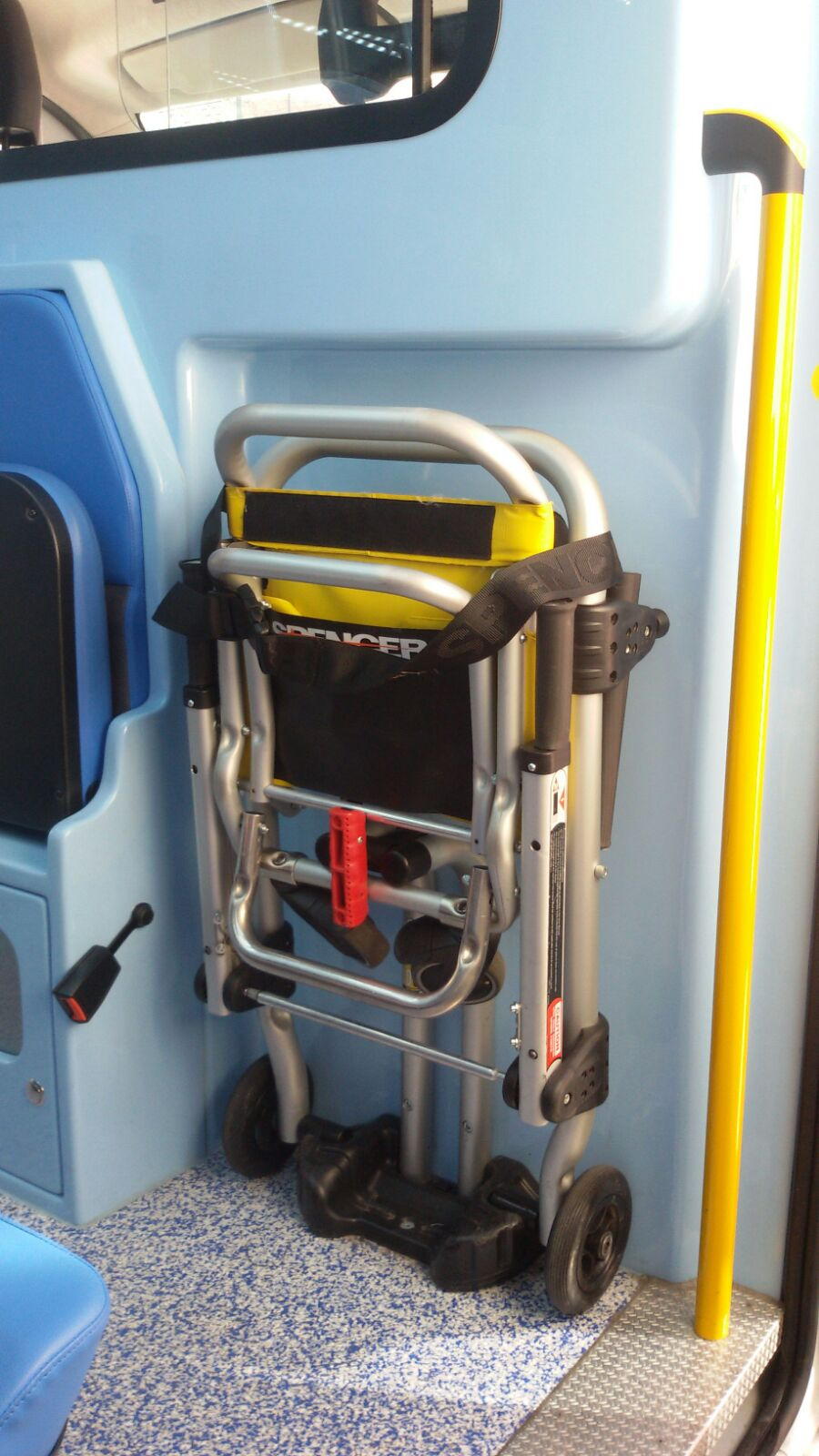 Esempio di sedia portantina in ambulanza